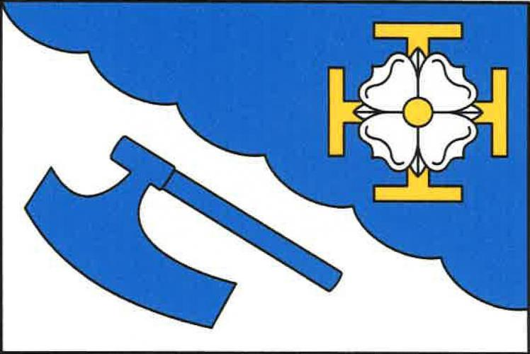 Svaté Pole vlajka